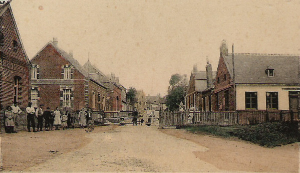 La gare d'Equancourt en 1909.